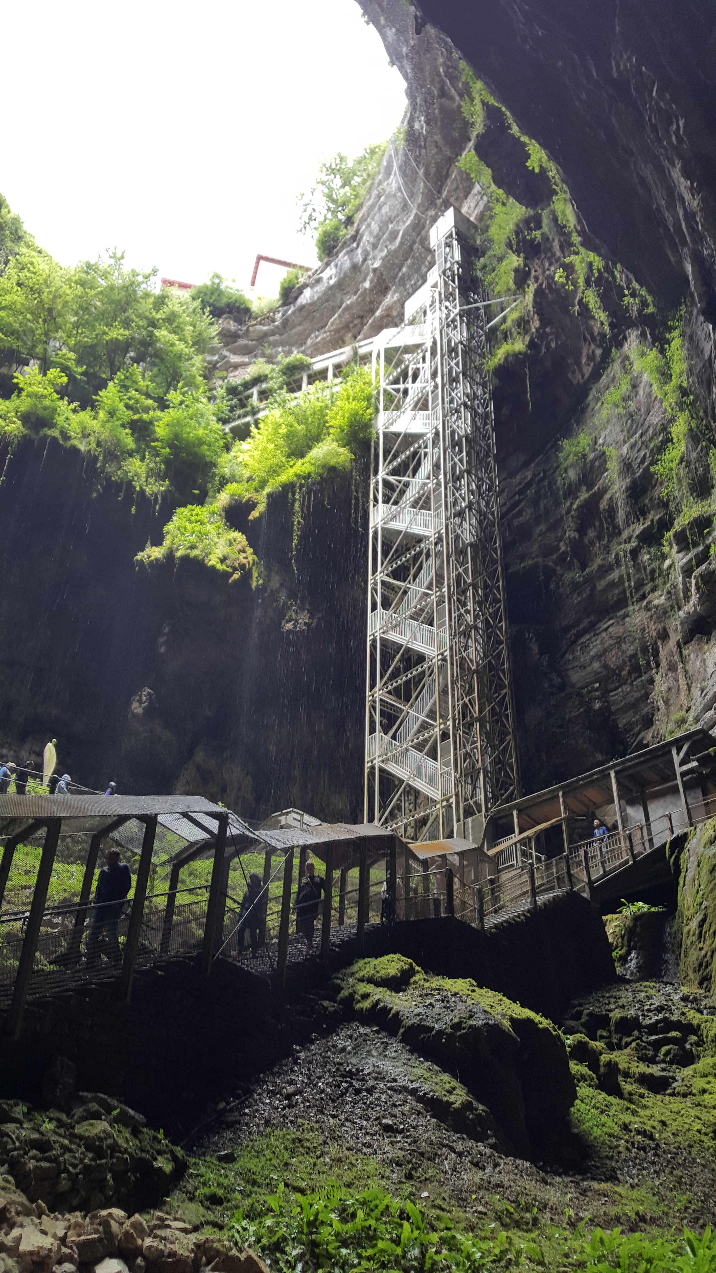 Padirac Cave